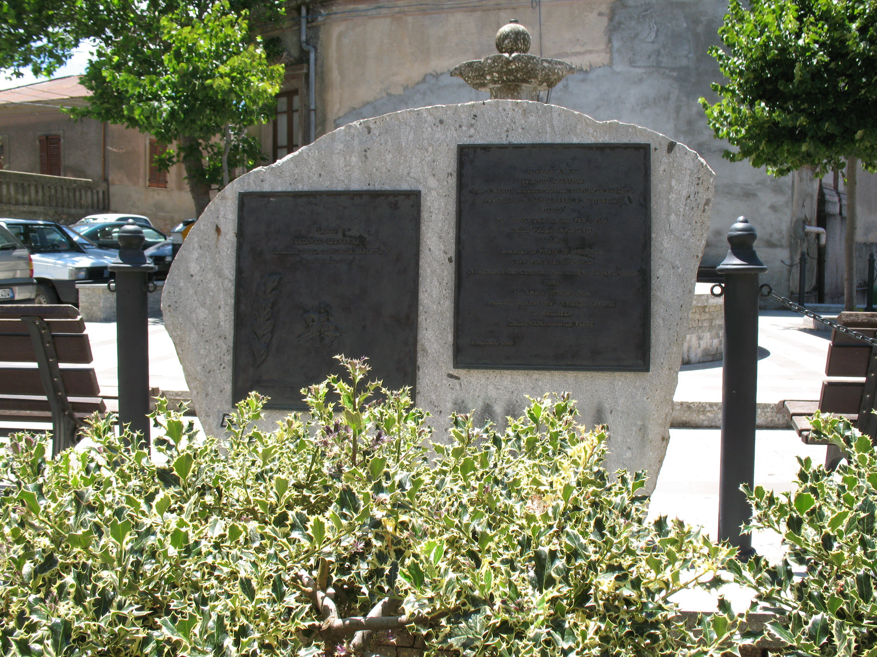 San Lorenzo, lapide che celebra Ludovico Abenavoli, partecipante alla disfida di Barletta